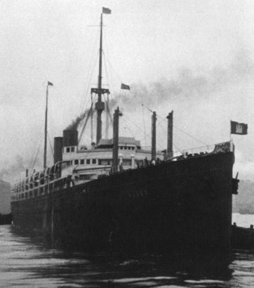 The immigrant ship Hansa (former Deutschland)